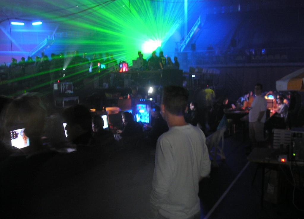 Afbeelding van LAN = LIFE 5 lasershow